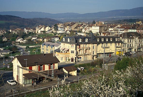 La Sarraz: Im Vordergrund der Bahnhof, im Hintergrund das historische Städtchen und die Höhen des Juras.